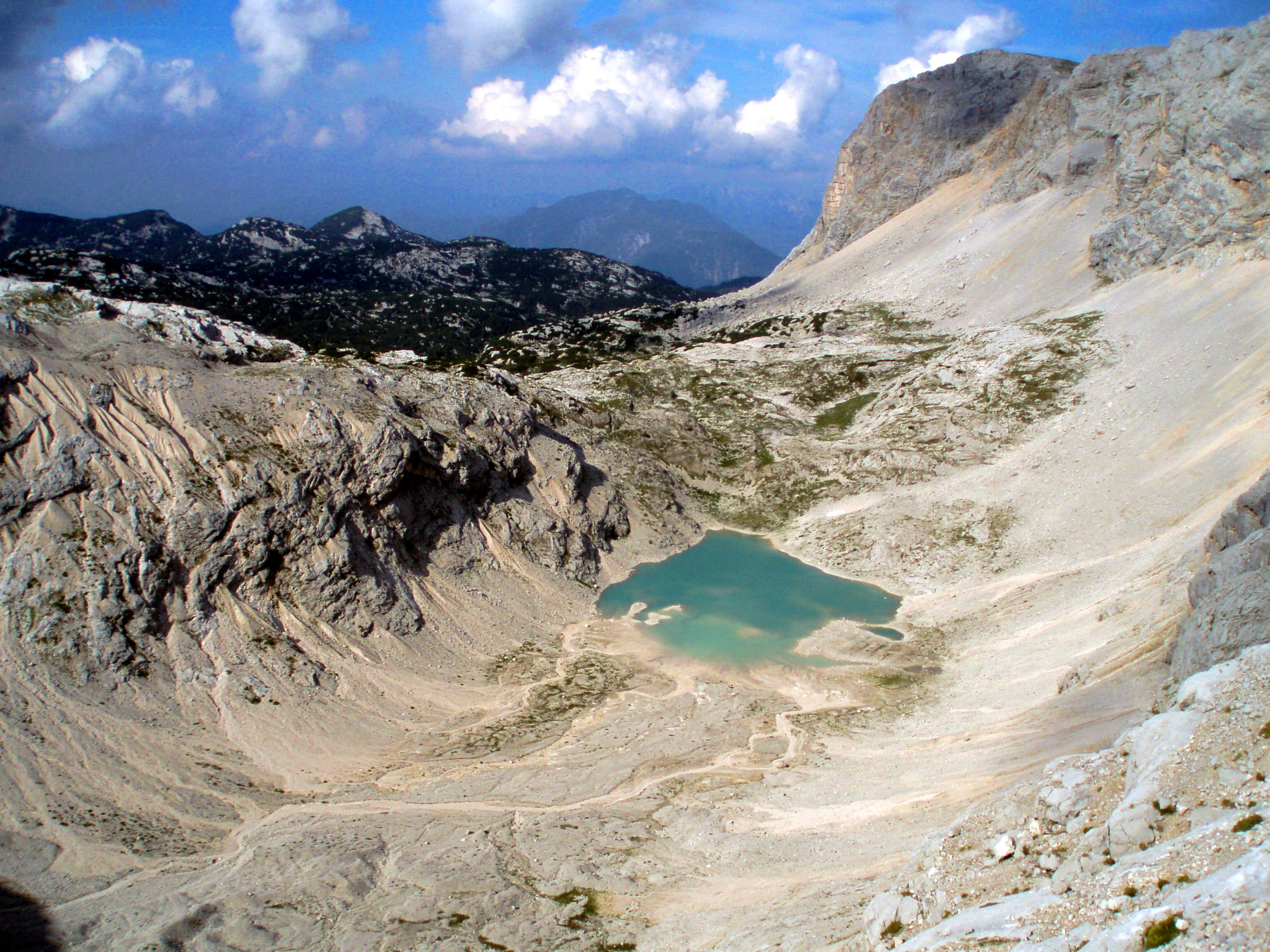 Oberer Eissee